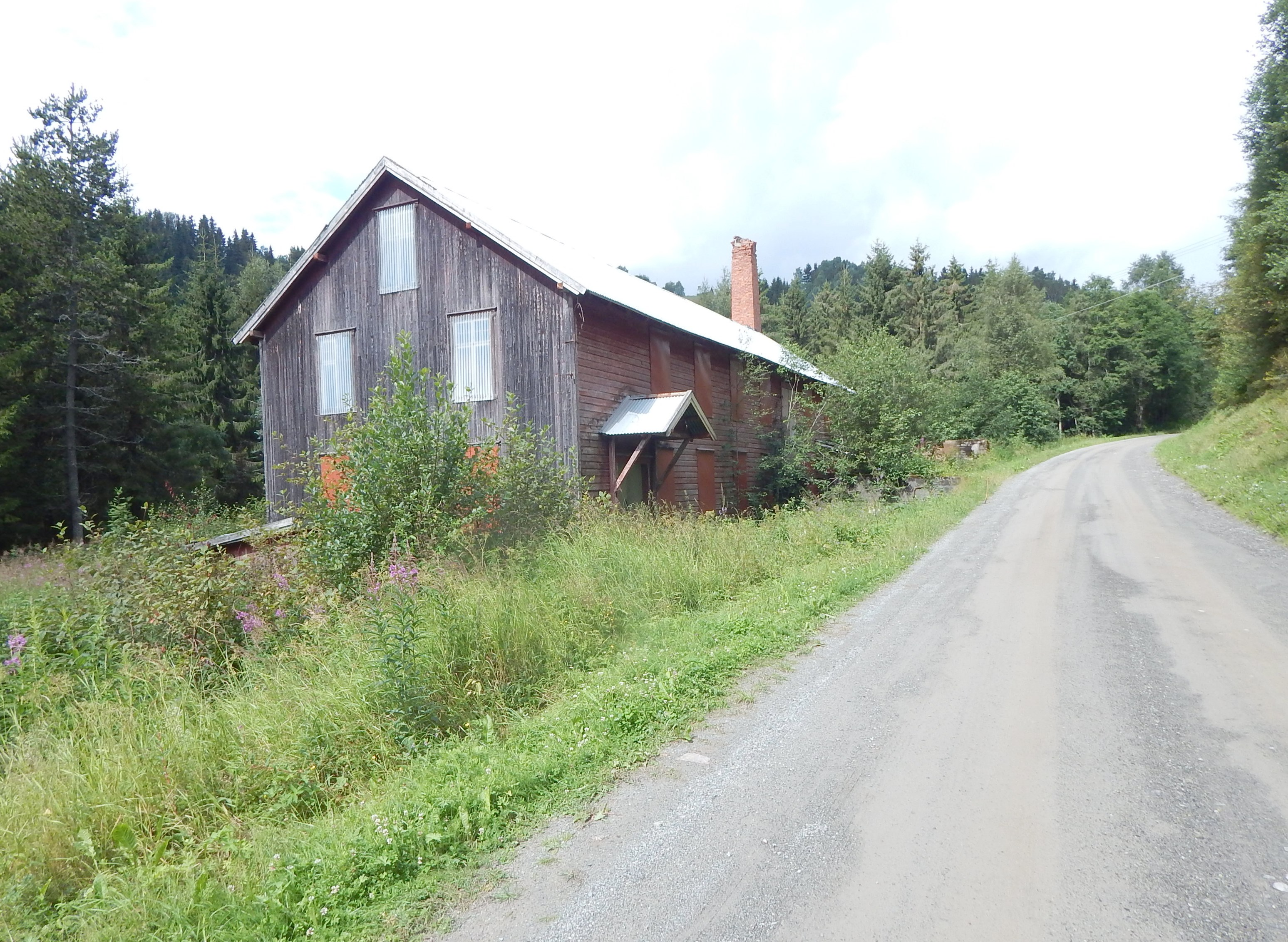 Østbrumundvegen (fylkesvei 1716, tidl. 51) ved Mariendal